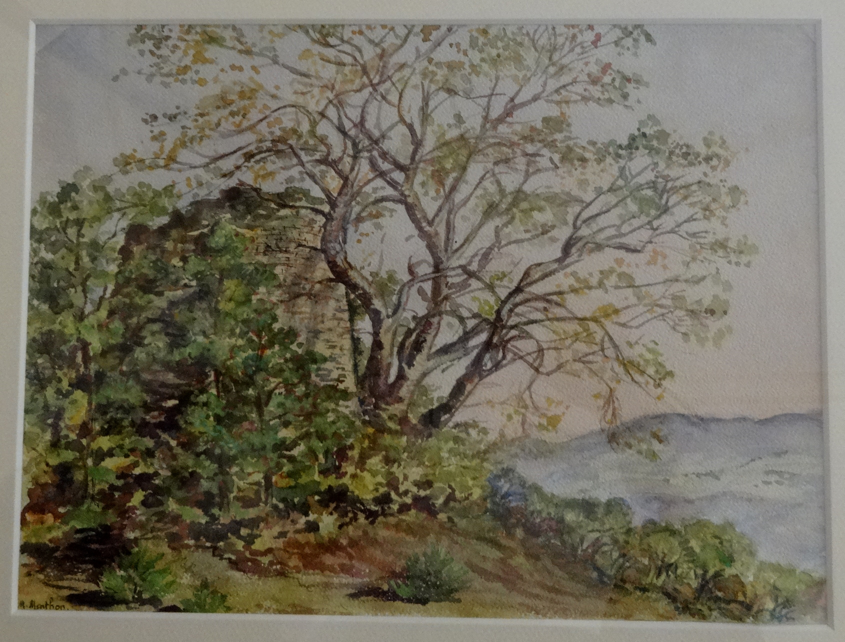 Aquarelle du château de Crête (Versonnex, Haute-Savoie) réalisée en 1960 par Marguerite Menthon.